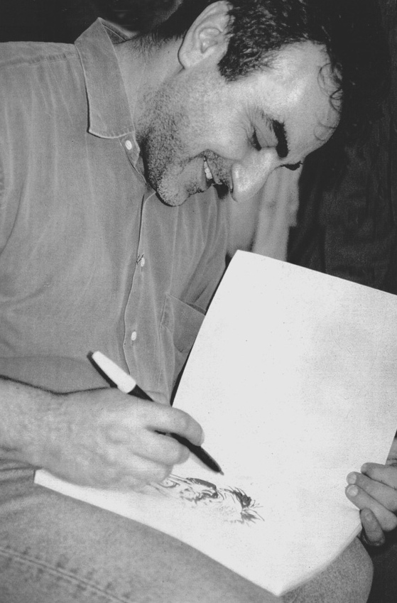 Il fumettista Tanino Liberatore, autore - insieme a Stefano Tamburini - del personaggio Rank Xerox